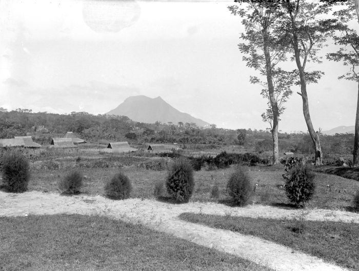 Negatief. Gezicht op de Gunung Andong vanaf het erf van de pasanggrahan Kopeng